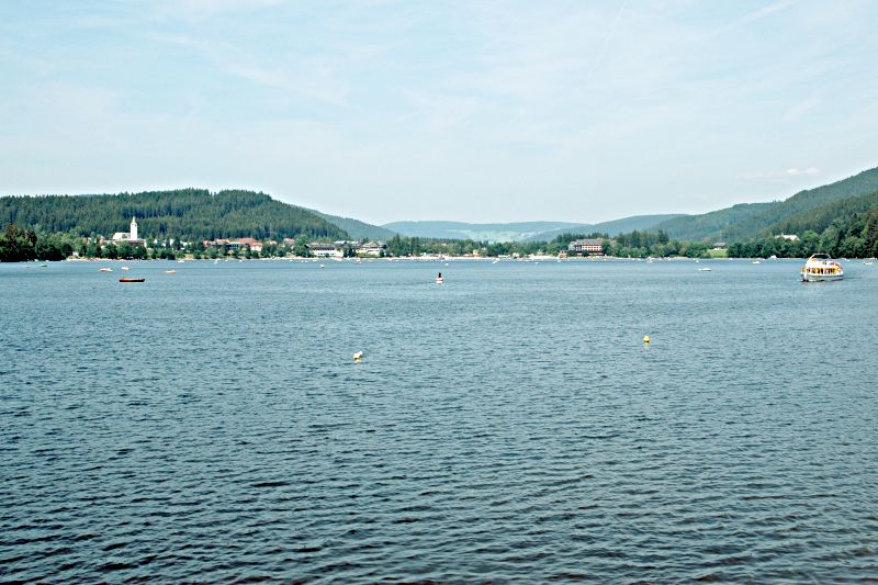 Blick über den Titisee auf den gleichnamigen Kurort.